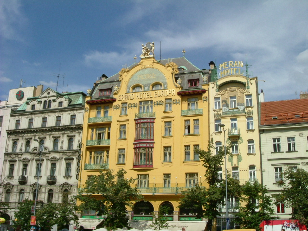 Die Jugendstilhotels "Grand Hotel Europa" und "Meran" auf dem Wenzelsplatz in Prag